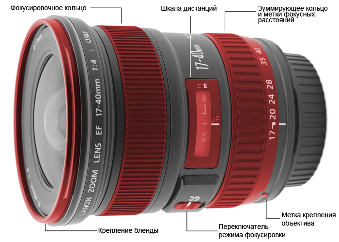 Элементы объектива Canon EF.